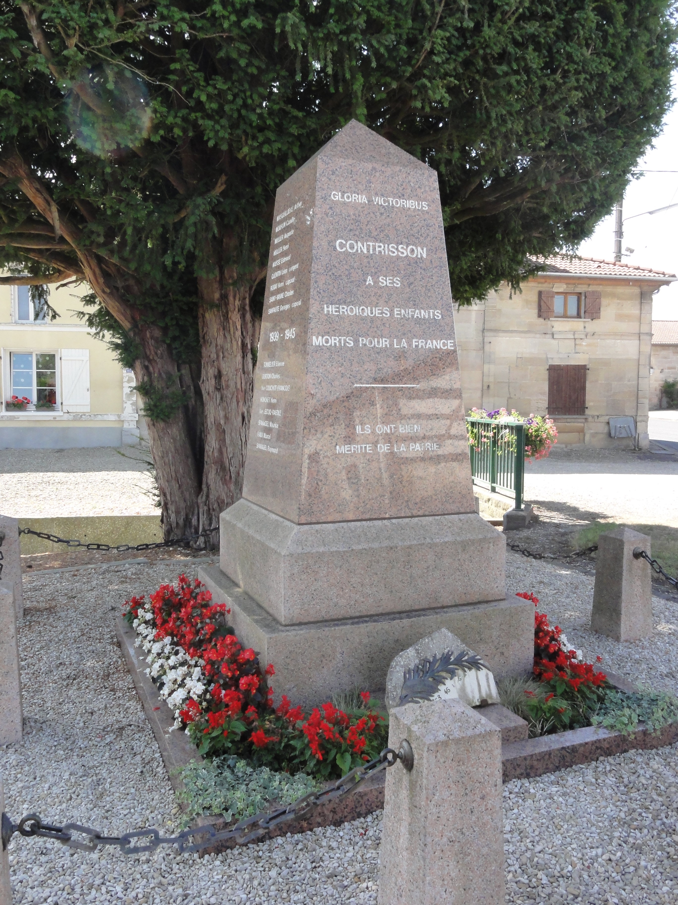 Contrisson (Meuse) monument aux morts